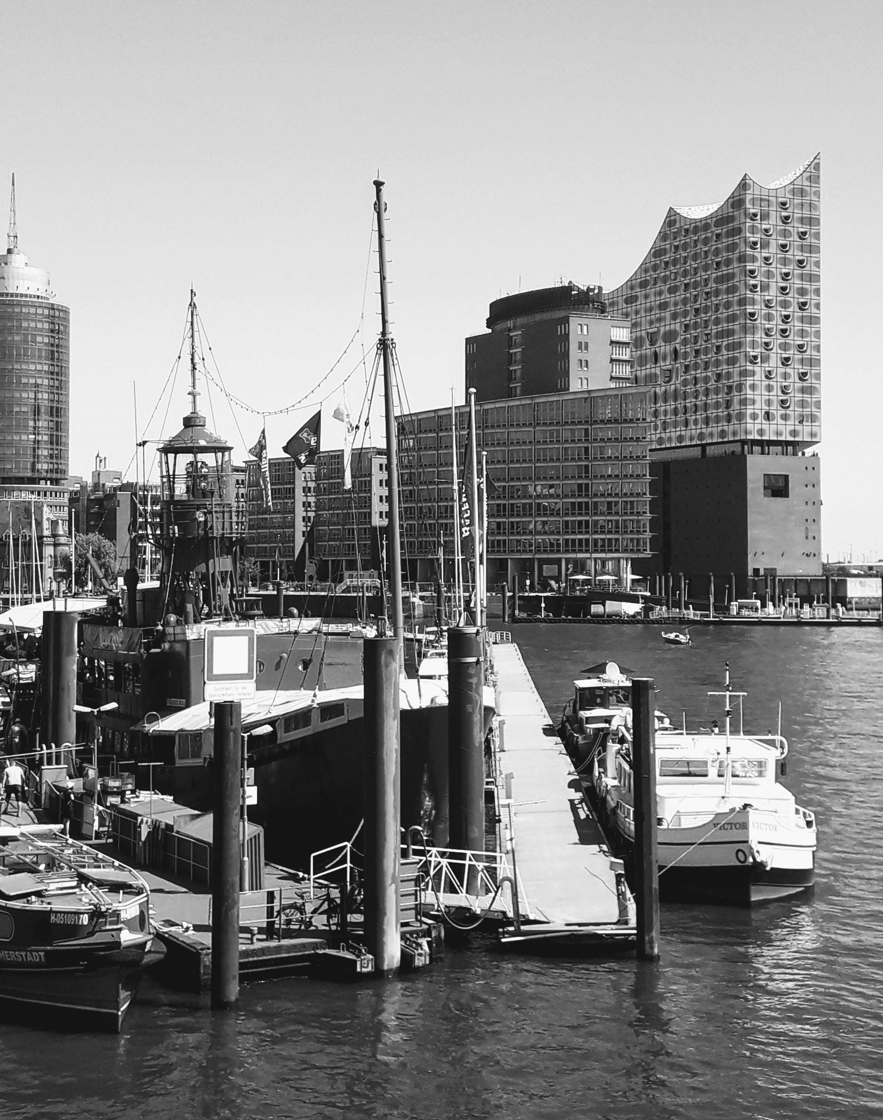 Blick auf die Elbphilharmonie im Sommer 2019.